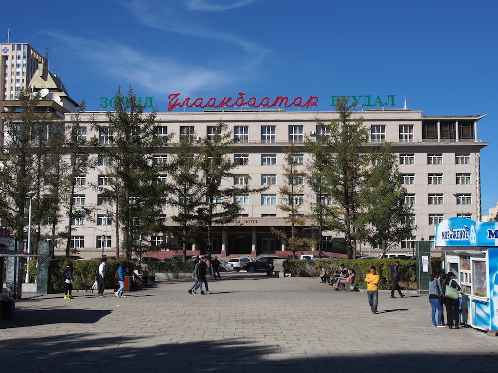 Ulaanbaatar Hotel